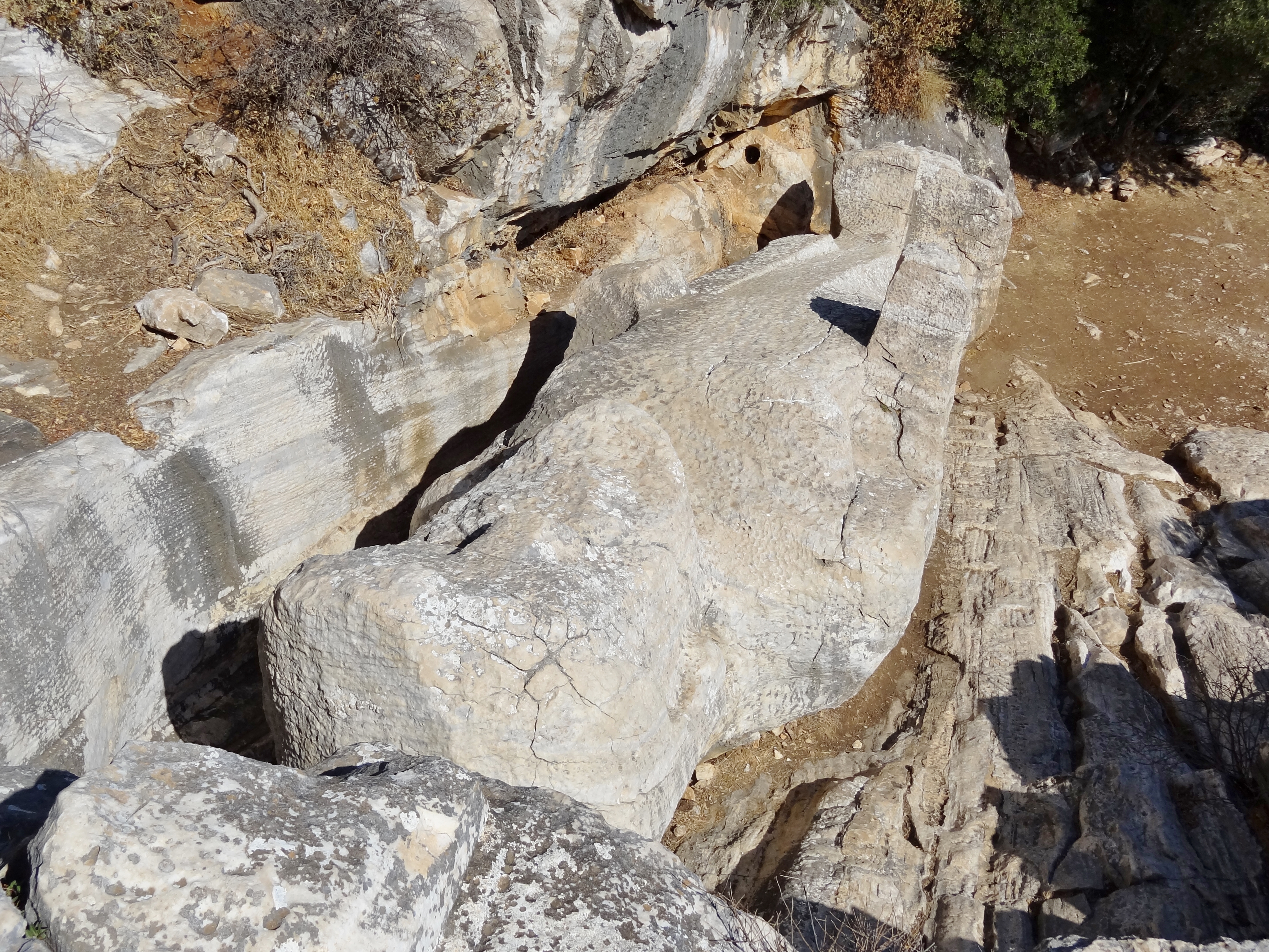 Kouros (Statue des Dionysos) oberhalb von Apollonas im Nordosten von Naxos, Kykladen, Griechenland